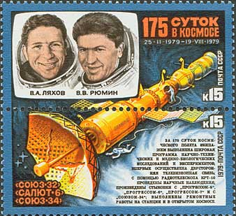 Почтовая марка СССР - Ляхов Владимир Афанасьевич и Попов Леонид Иванович, Герои Советского Союза